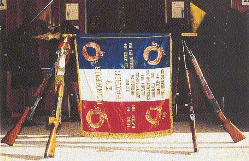 Le fameux drapeau des chasseurs .